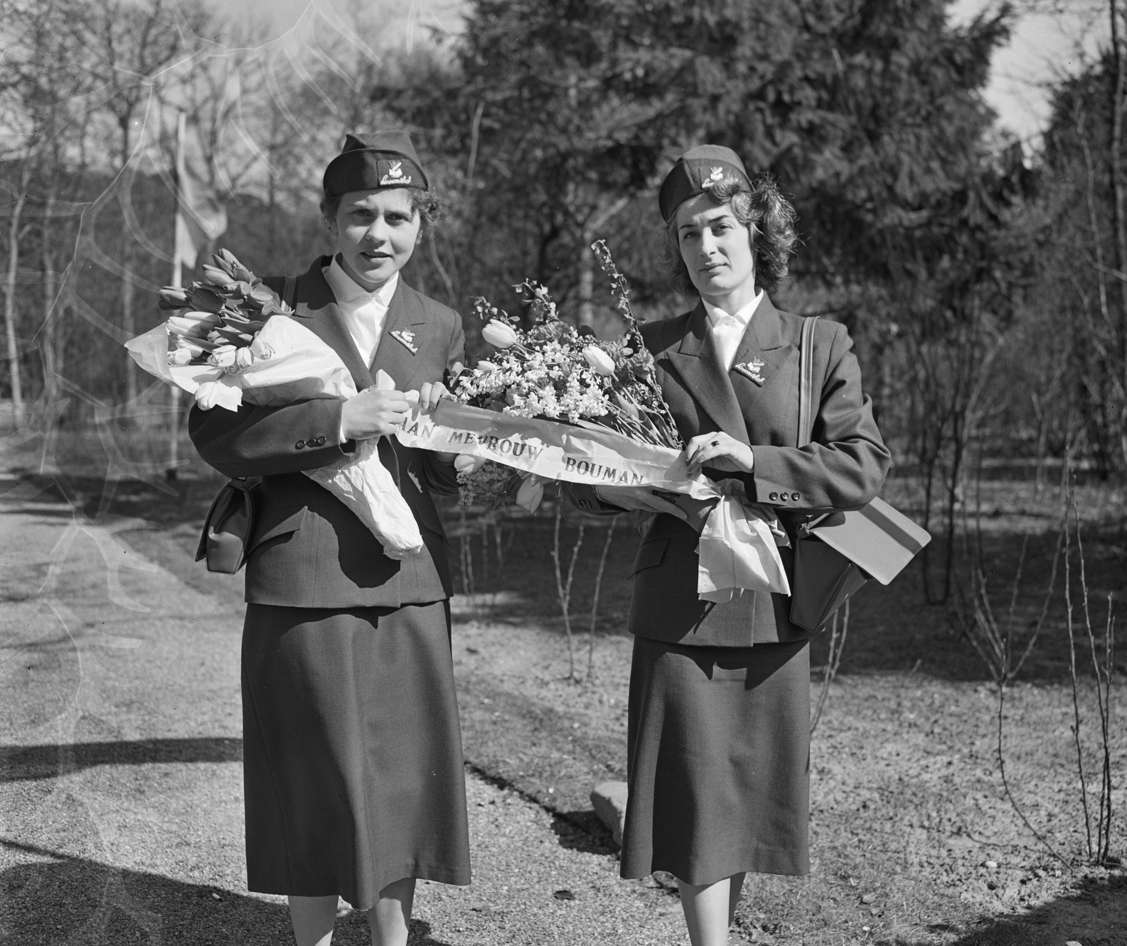 Collectie / Archief : Fotocollectie Anefo Reportage / Serie : [ onbekend ] Beschrijving : Opening Linnaeushof Bennebroek. Bloemen voor mevrouw Bouman Annotatie : Twee KLM stewardessen. Oud nummer 907-8859. Datum : 11 april 1956 Locatie : Noord-Holland, Schiphol Fotograaf : Pot, Harry / Anefo Auteursrechthebbende : Nationaal Archief Materiaalsoort : Negatief (zwart/wit) Nummer archiefinventaris : bekijk toegang 2.24.01.04 Bestanddeelnummer : 907-6857